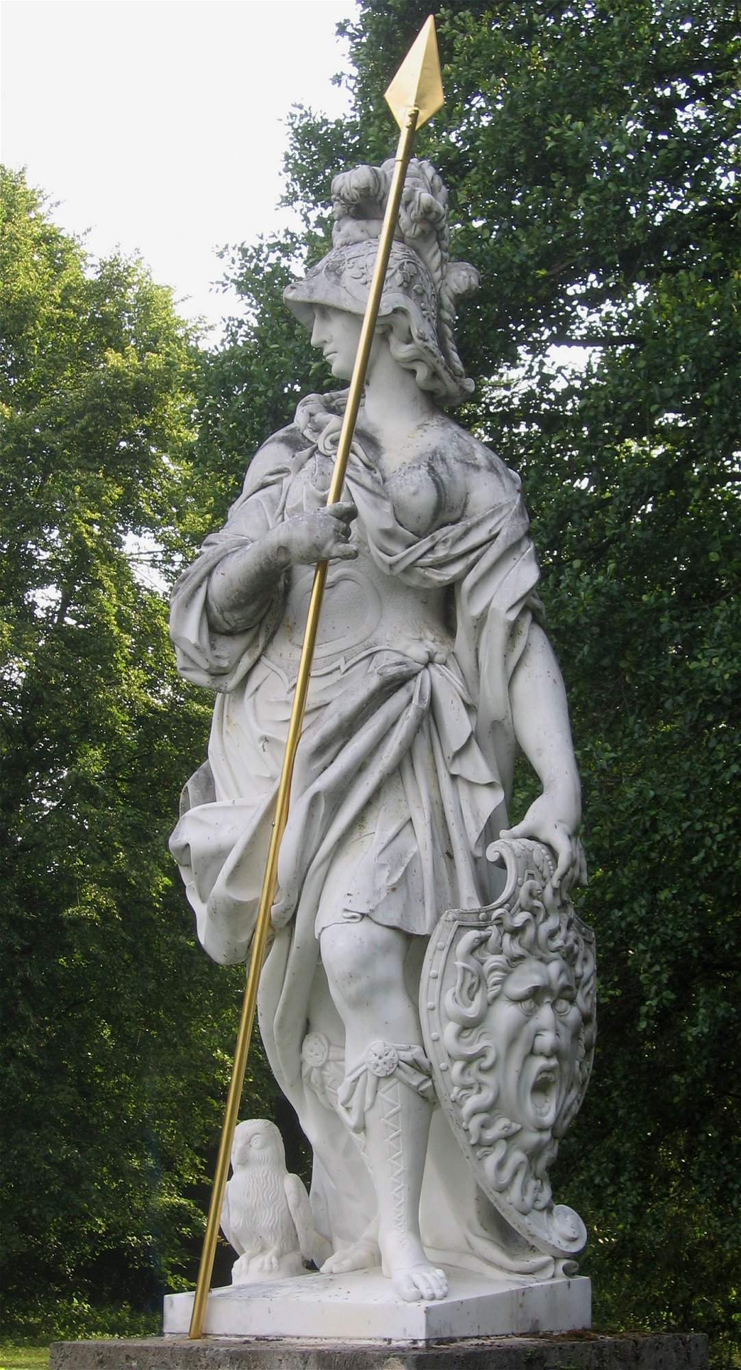 Statue der Minerva von Giuseppe Volpini (1722/23) an der Großen Kaskade im Schlosspark Nymphenburg, München